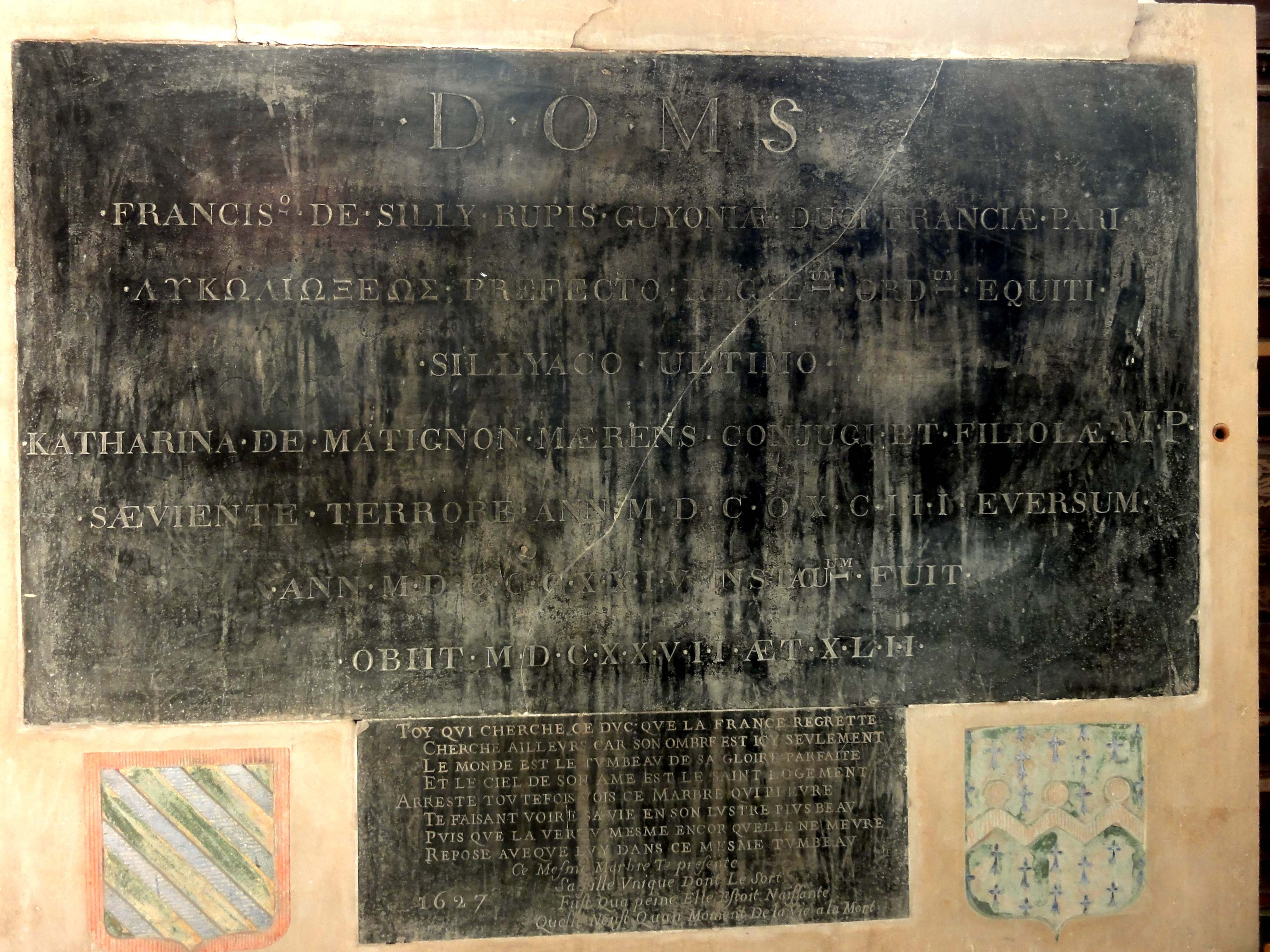 Monument funéraire de François de Silly, 1637.